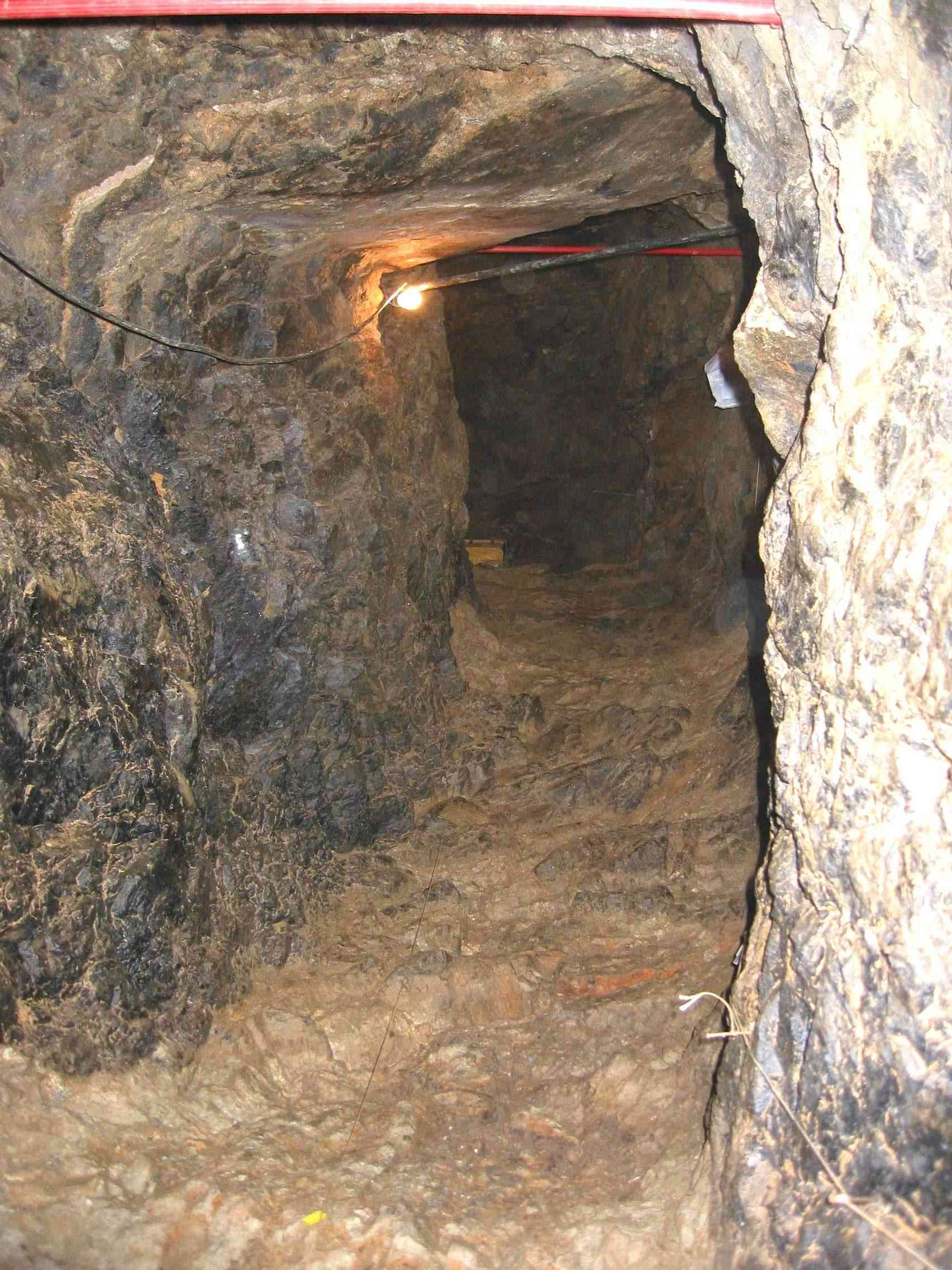 Arditurriko meatzeetako galeria, Oiartzun, Gipuzkoa. 2004.